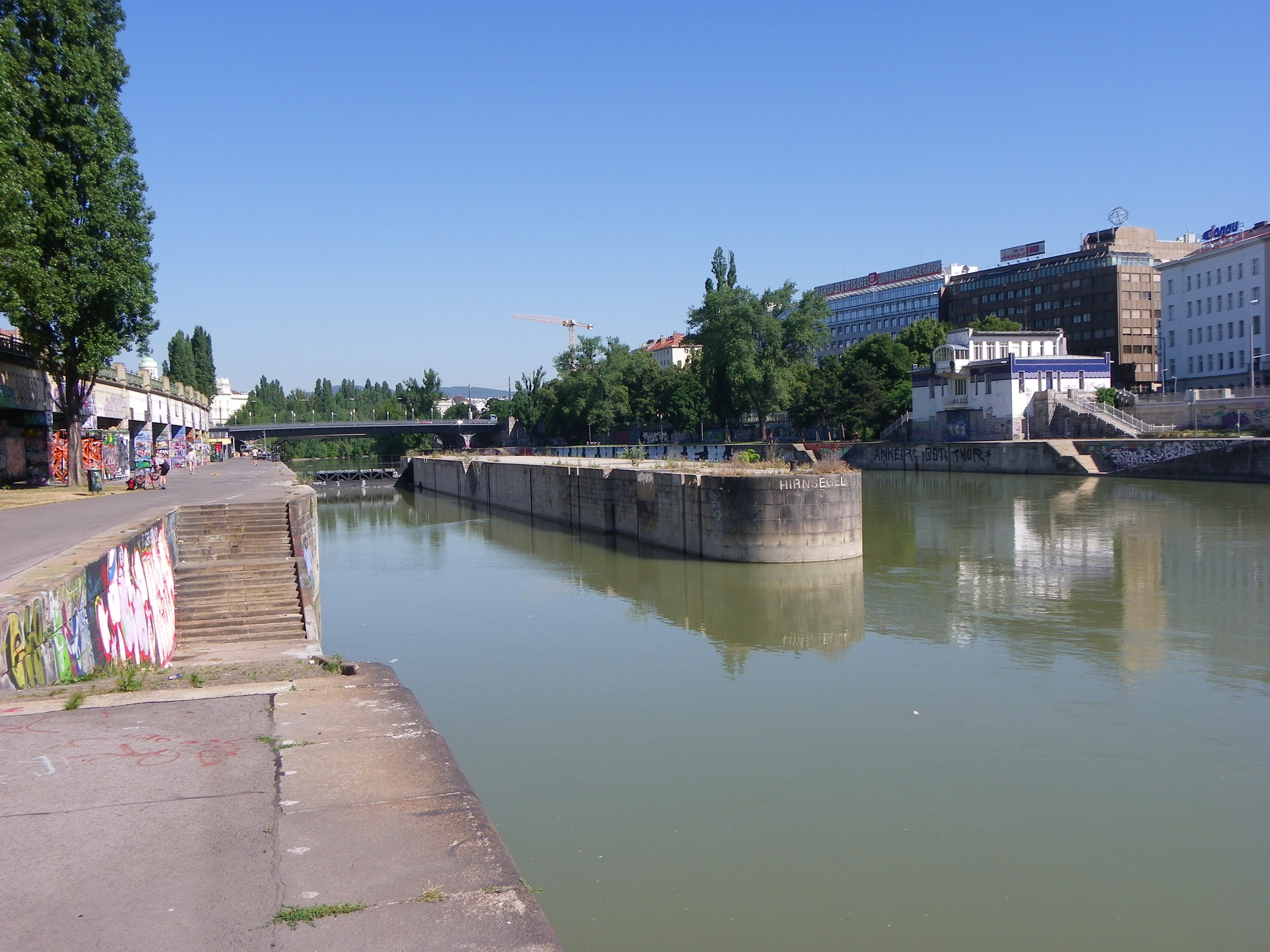 Wien Kaiserbadschleuse